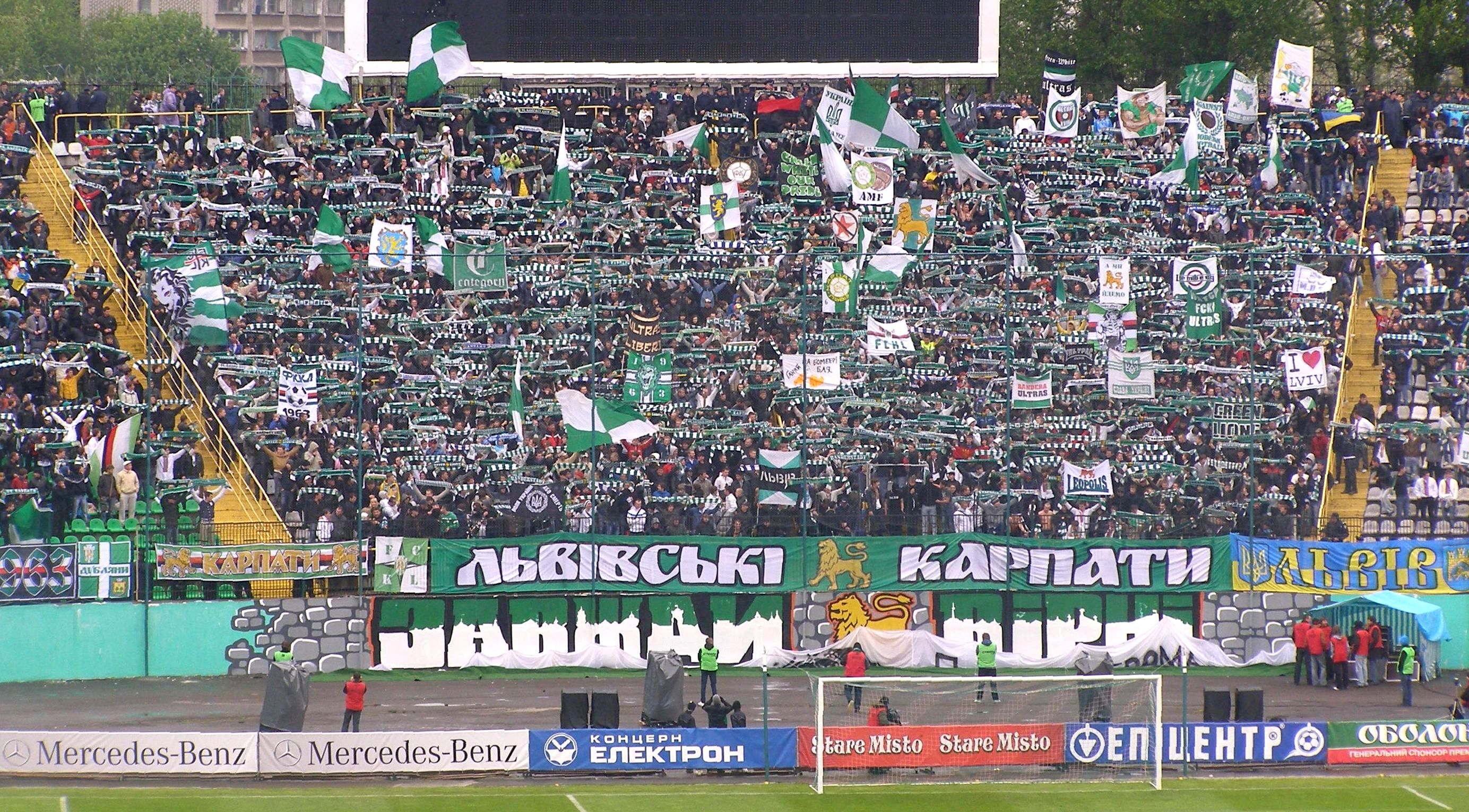 Karpaty Lwiw fans in den Sektoren 15 und 16 des Ukrajina-Stadion, Lwiw